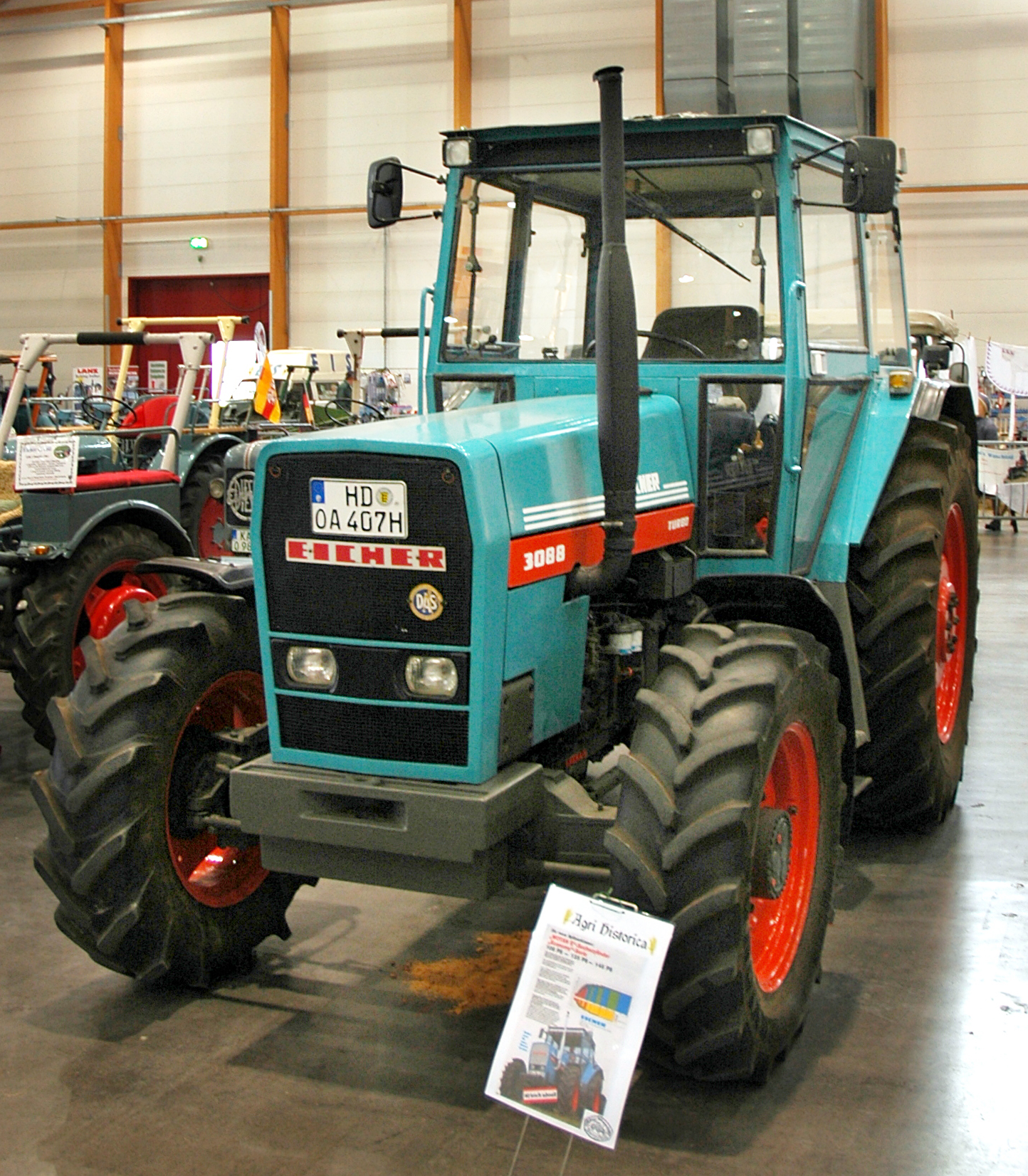 Siensheim Agri Historica 2015: Eicher 3088